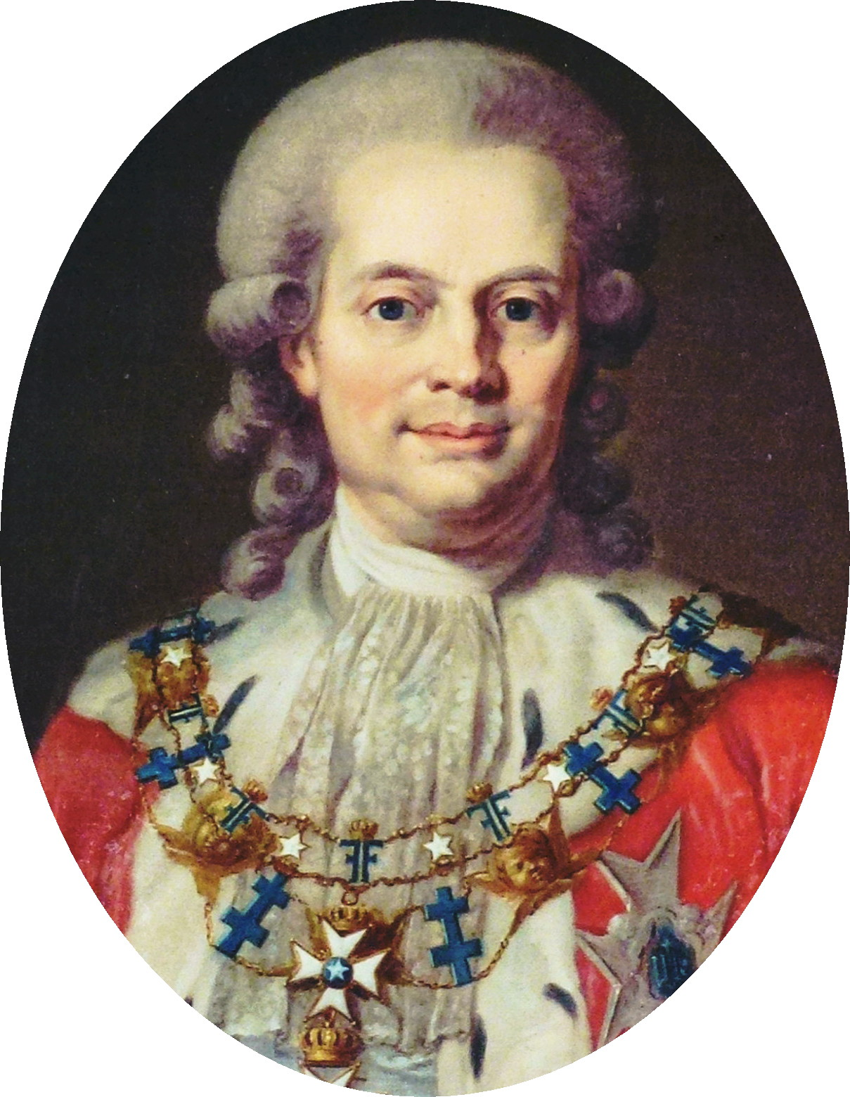 Johan Liljencrantz (1730-1815)